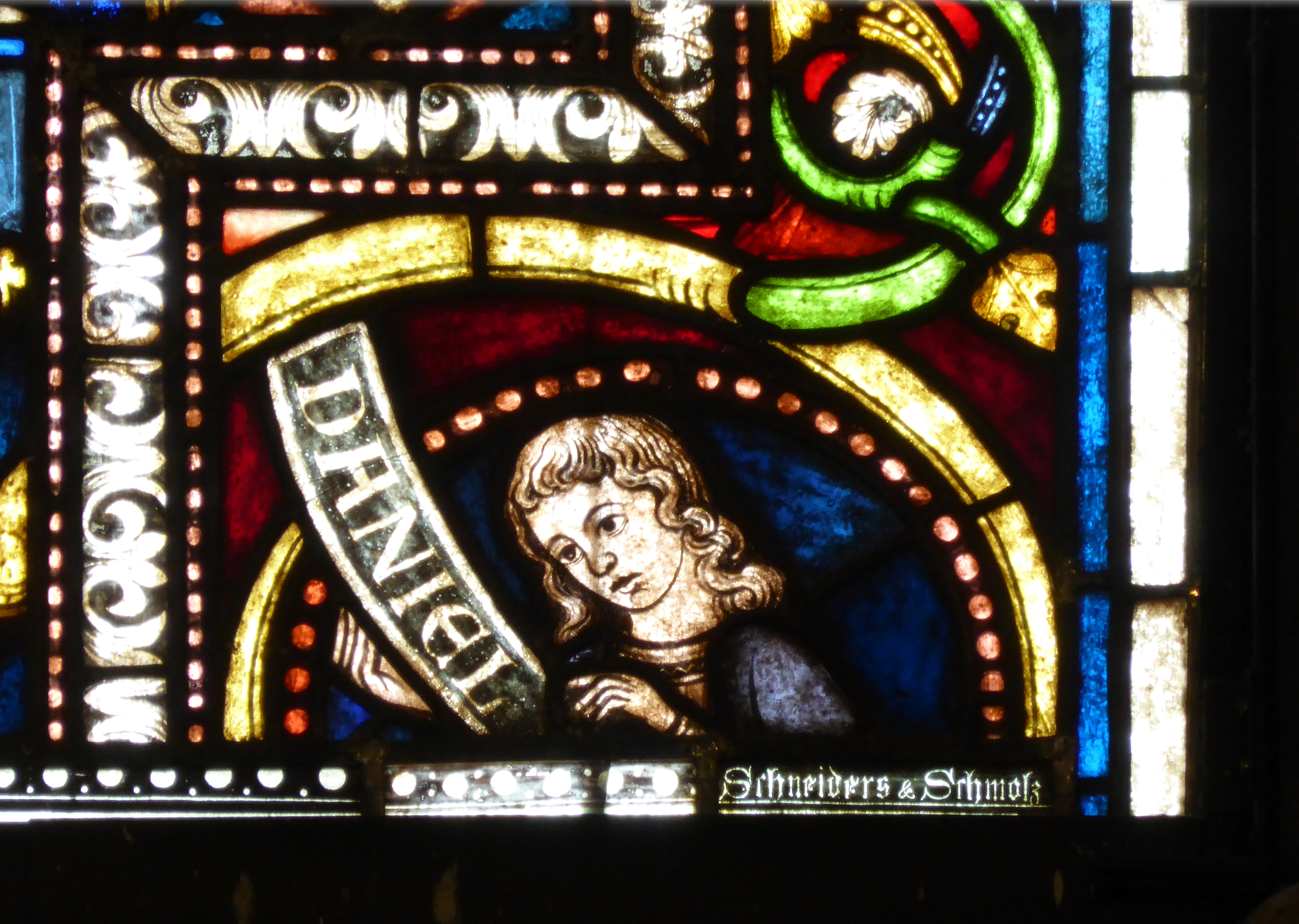 Firmensignée Glasmalerei Schneiders und Schmolz im Kölner Dom (Domchorfenster).